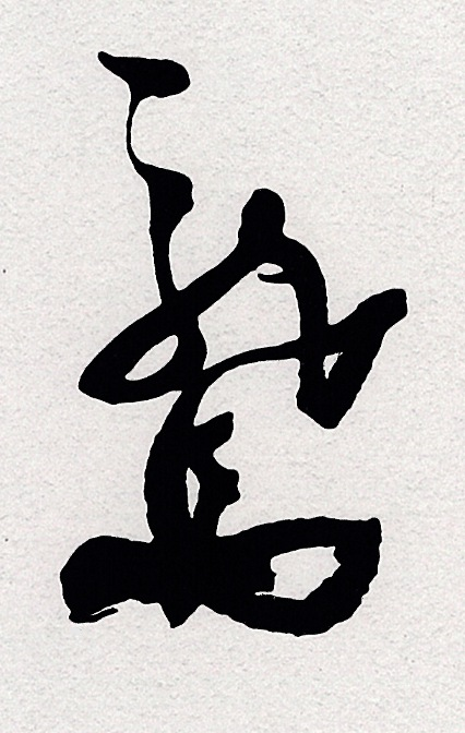 坂本龍馬の署名